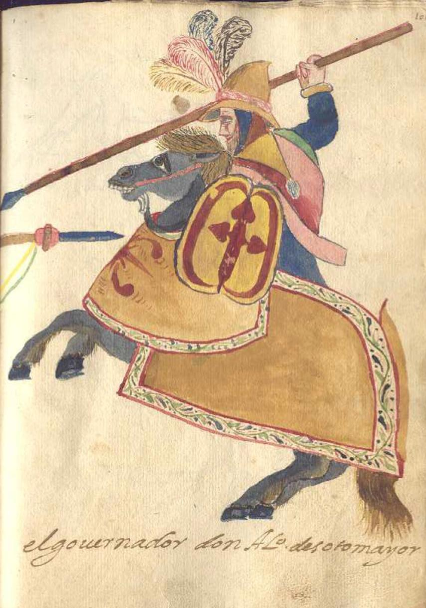 Alonso de Sotomayor, conquistador español